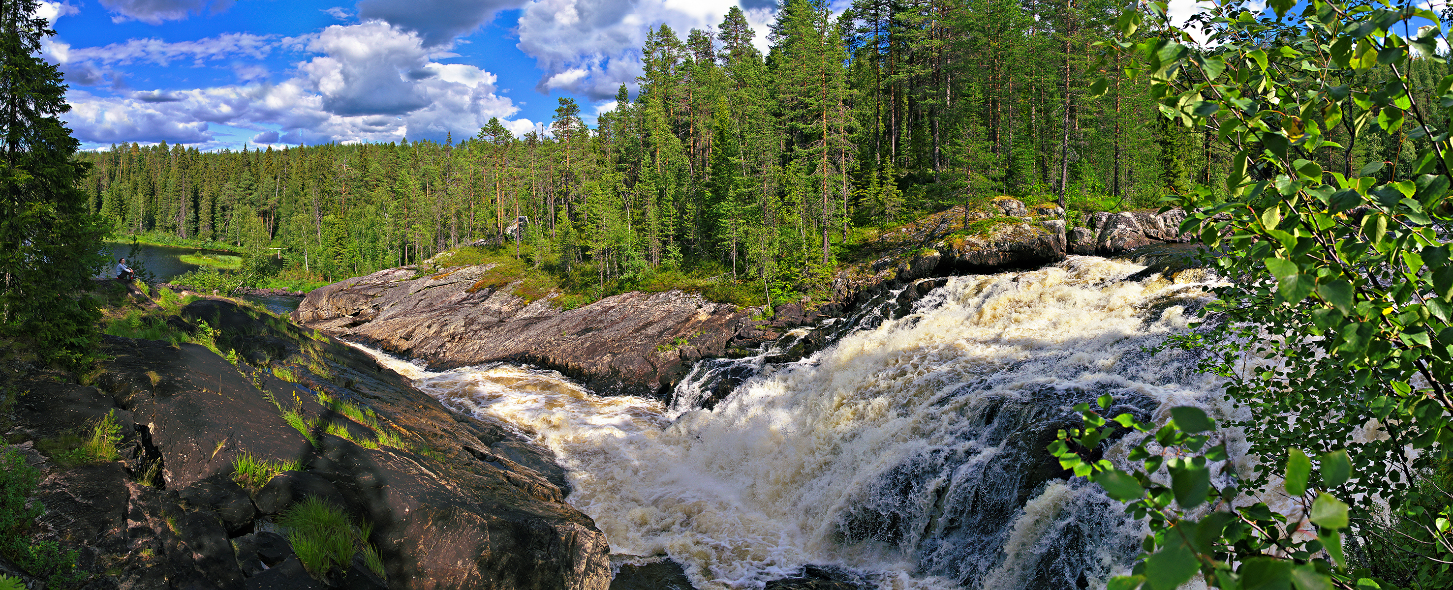 Войница заказник, Калевальский район порог-водопад «Куми» на Войнице This image is related to the protected area of Russia number 1010005